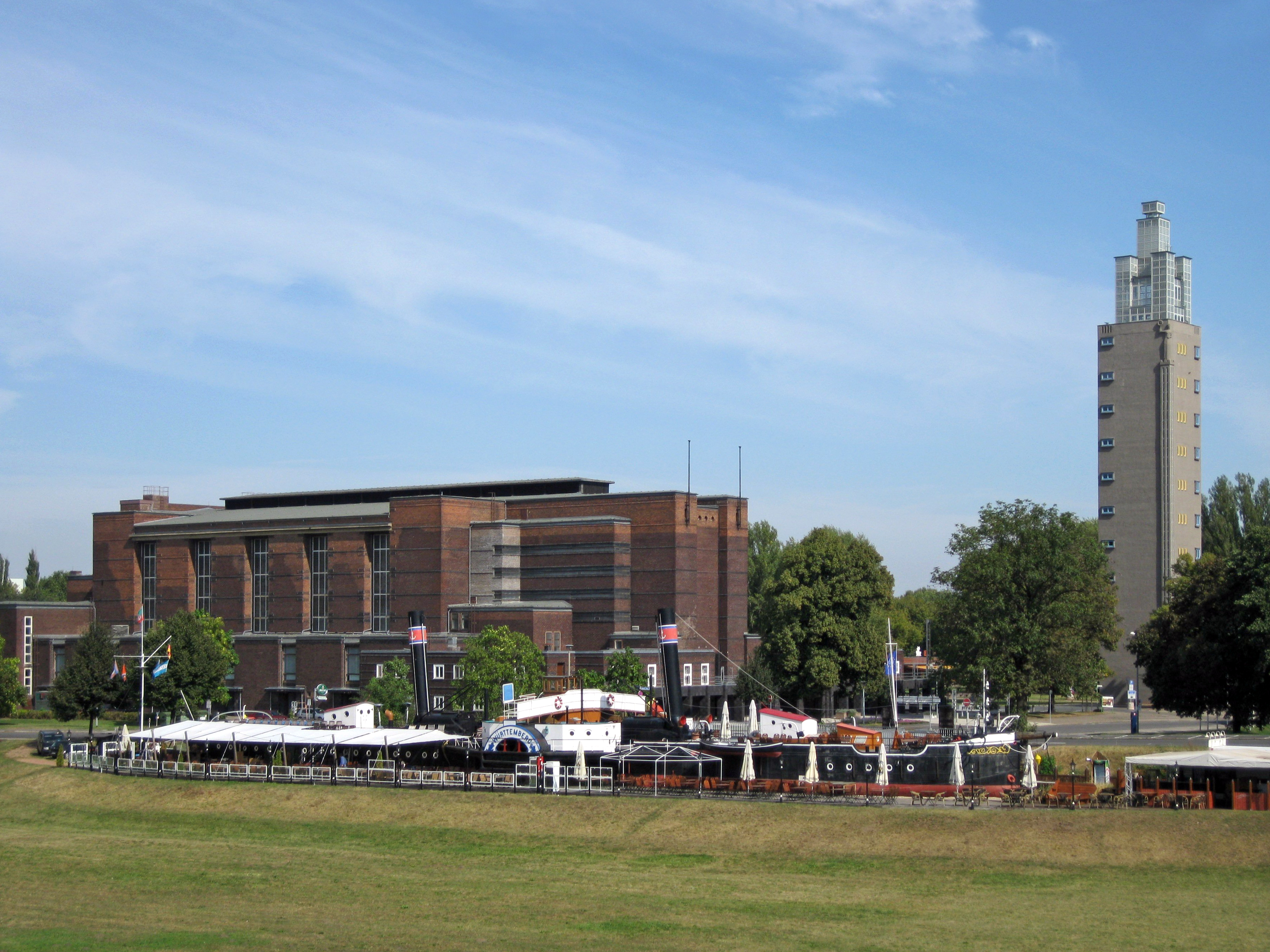 im Vordergrund Museumsschiff Württemberg, im Hintergrund die Stadthalle und der Aussichtsturm im Rotehornpark